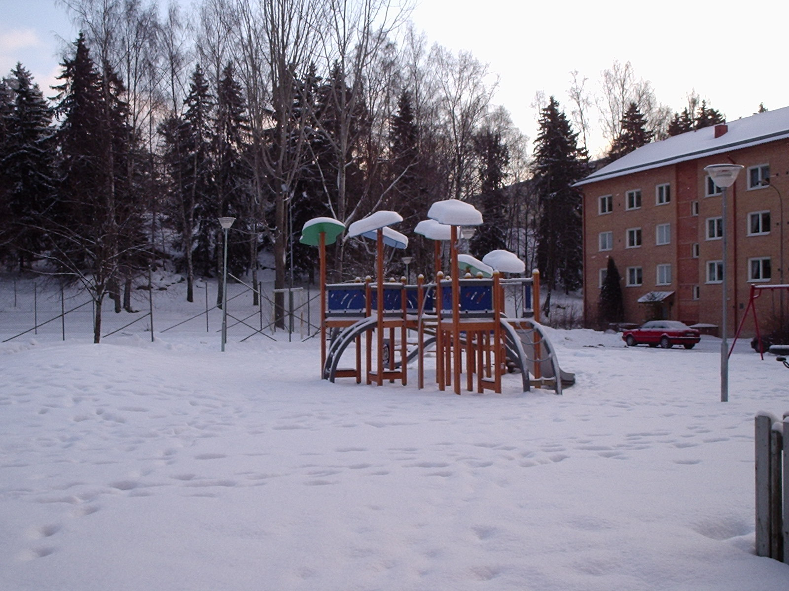 Leikkipaikka